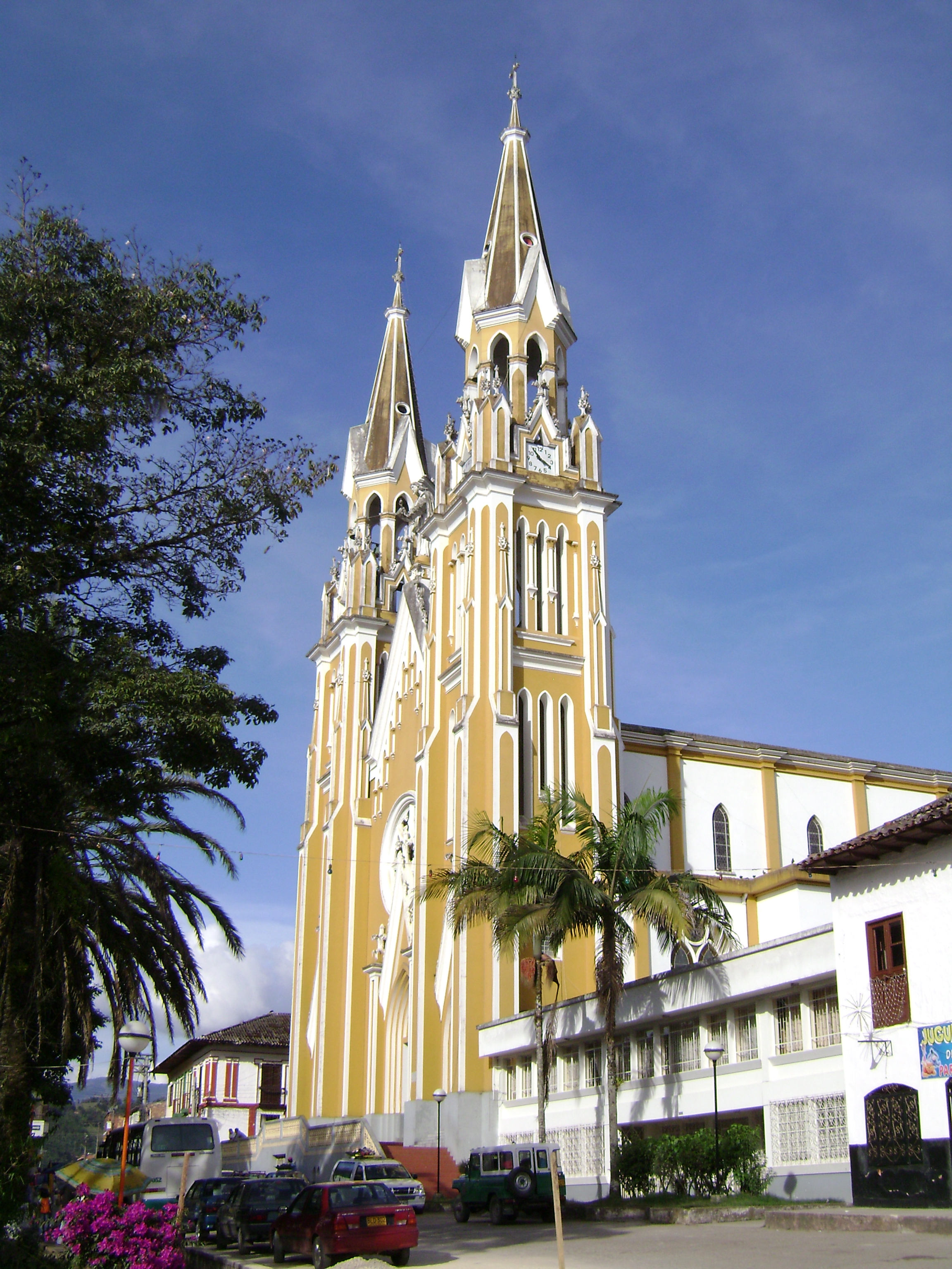 Catedral Garagoa Boyaca